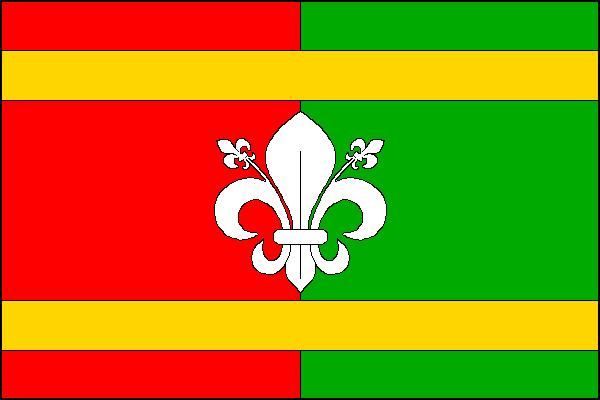 Vlajka obce Prasklice